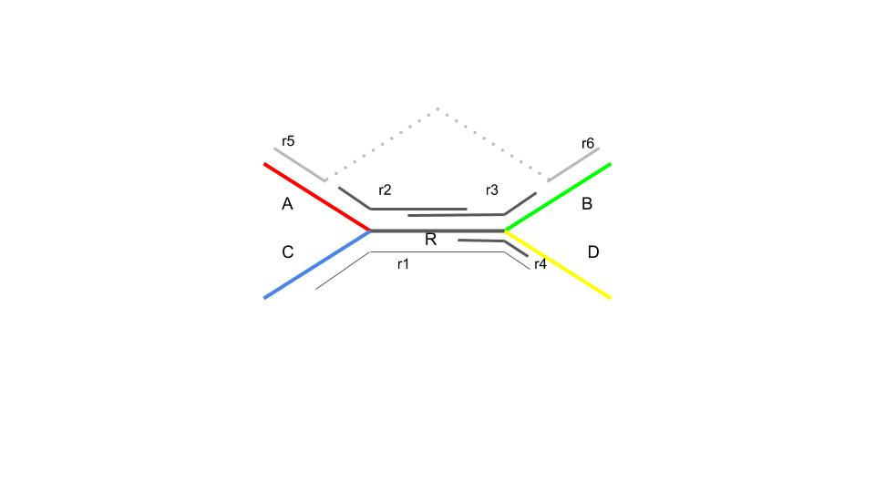 Данный графический пример отражает появление повтора в последовательностях транскриптов. A, B, C, D, - уникальные последовательности транскриптов, R - последовательность повтора. r1,2,3,4,5,6 - возможные прочтения секвенирования.